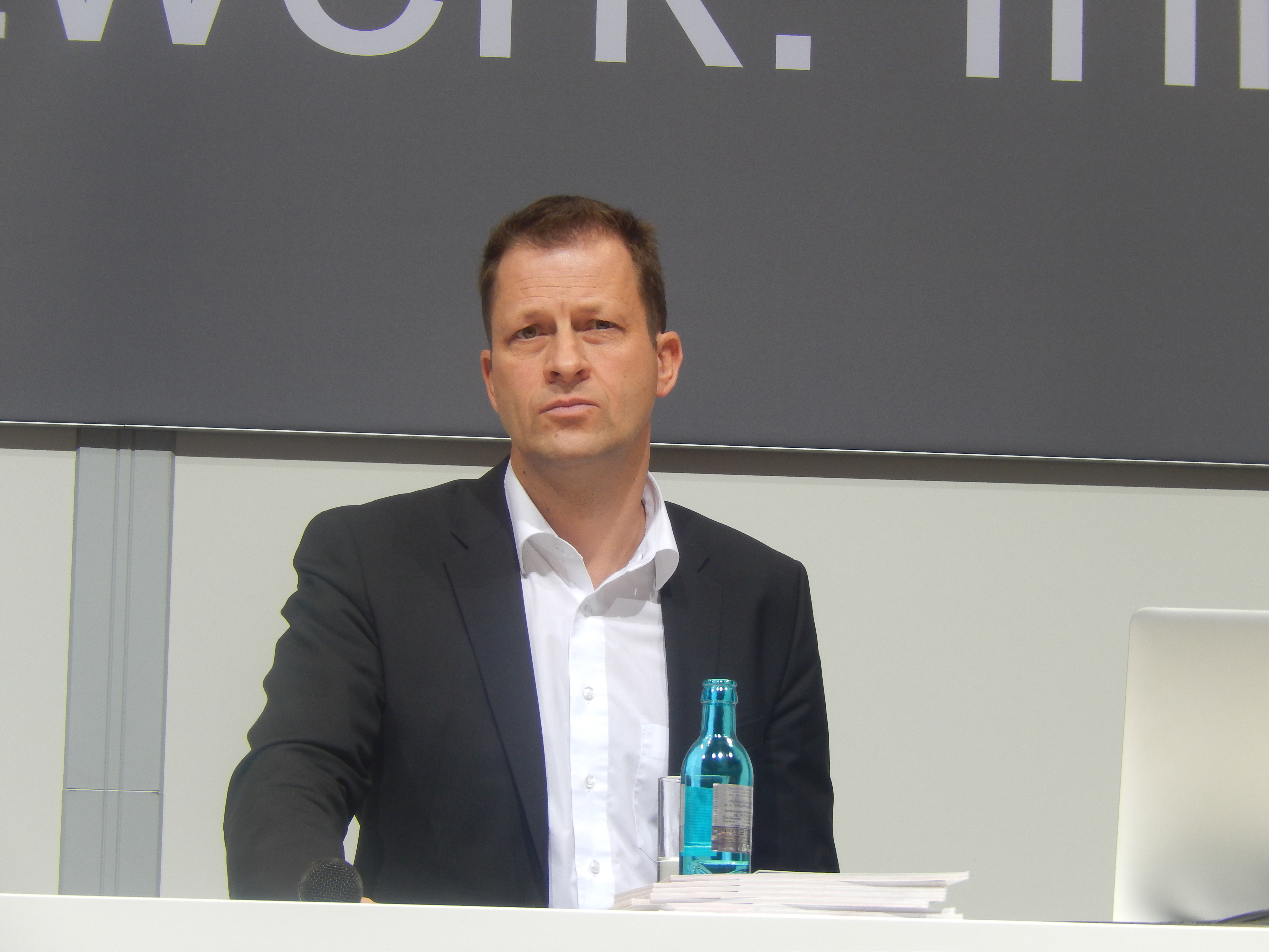 David Depenau